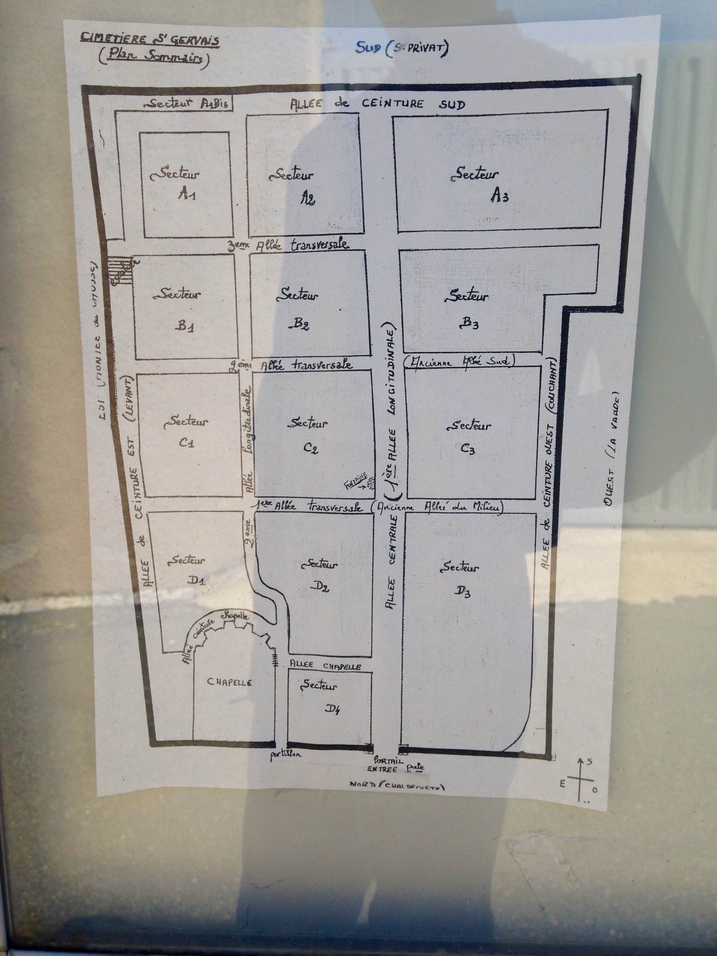 Plan du cimetière Saint-Gervais (Mende, France).